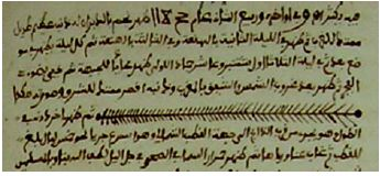 Schéma d'une comète dans un ouvrage en Kabylie (1778). Extrait du manuscrit Ma’lim al Istibs’r de Ash Shallatî, astronome algérien du XVIIIe siècle